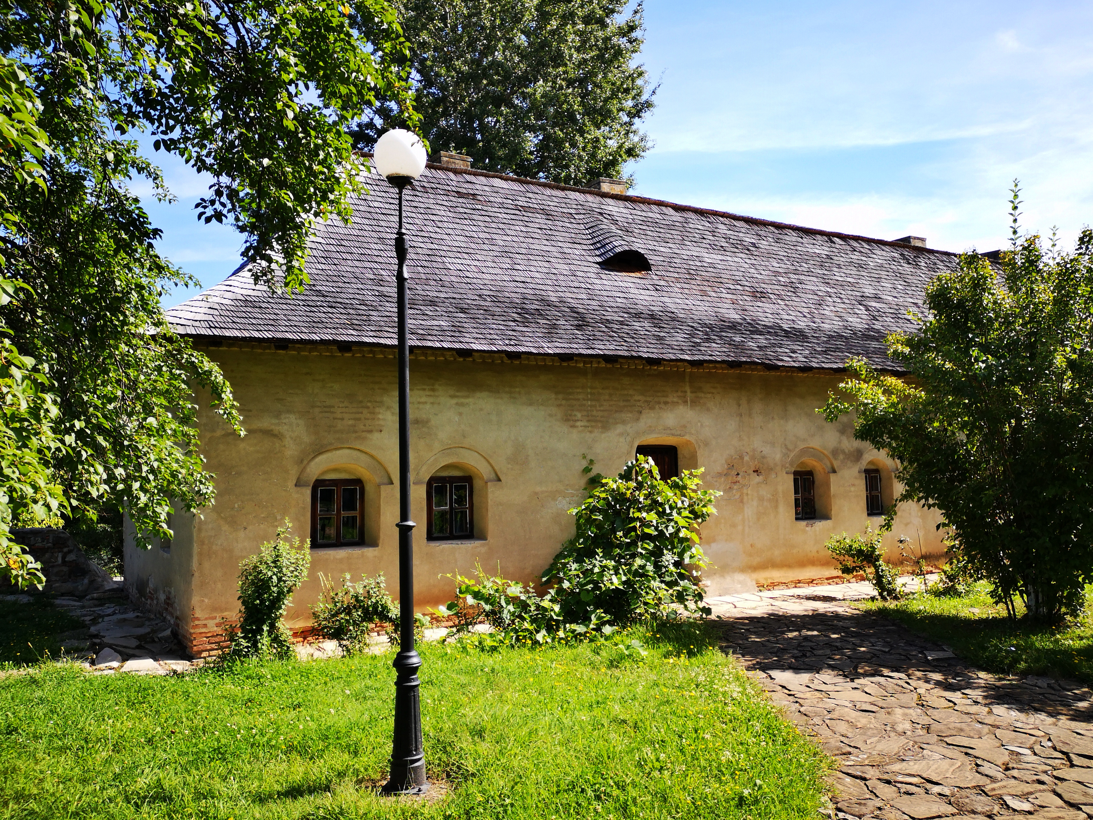 Casa Doamnei Bălașa-Bolnița 09